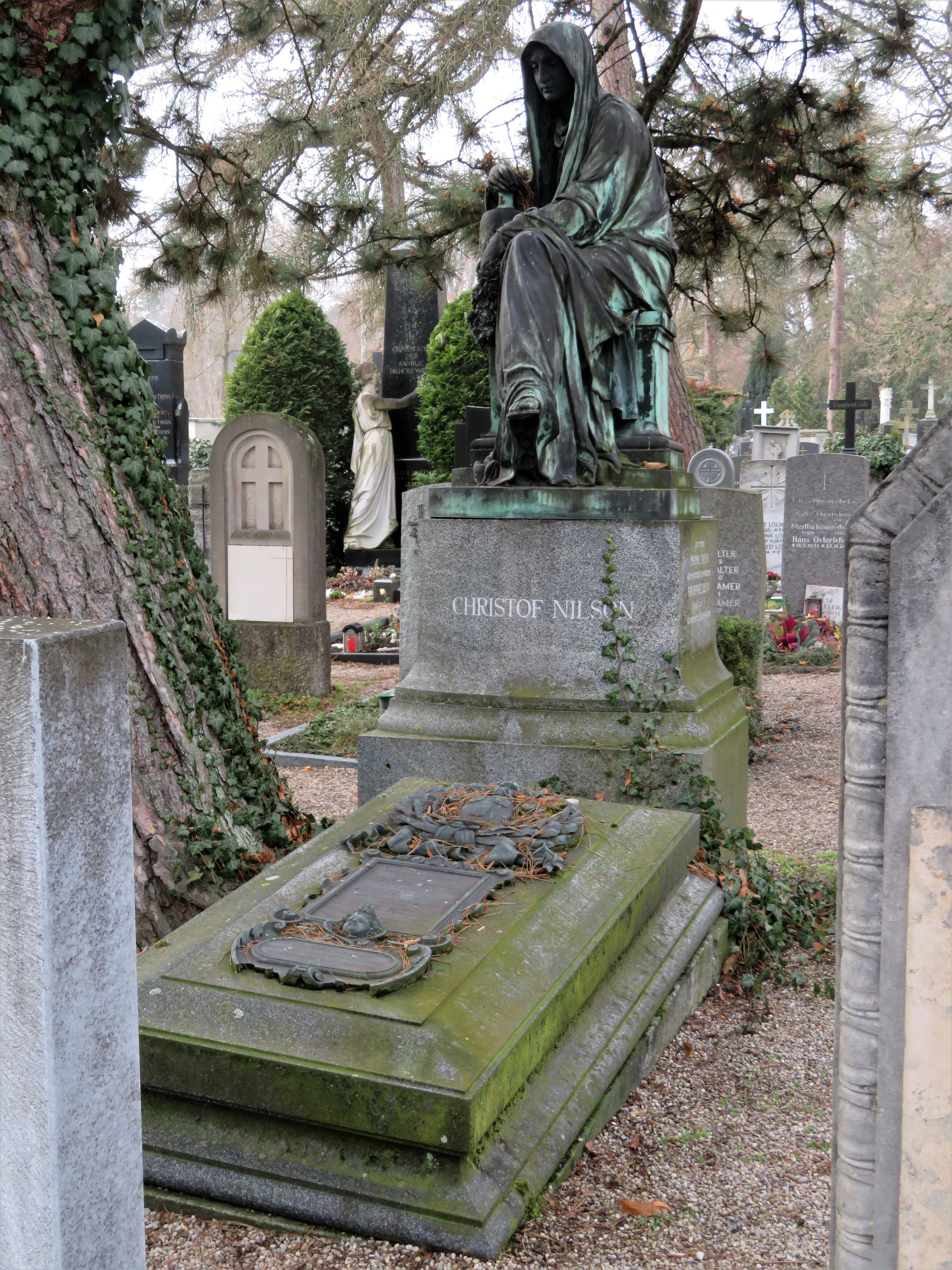 Grab des Historienmalers Christoph Friedrich Nilson (1811-1879) auf dem Protestantischen Friedhof in Augsburg.